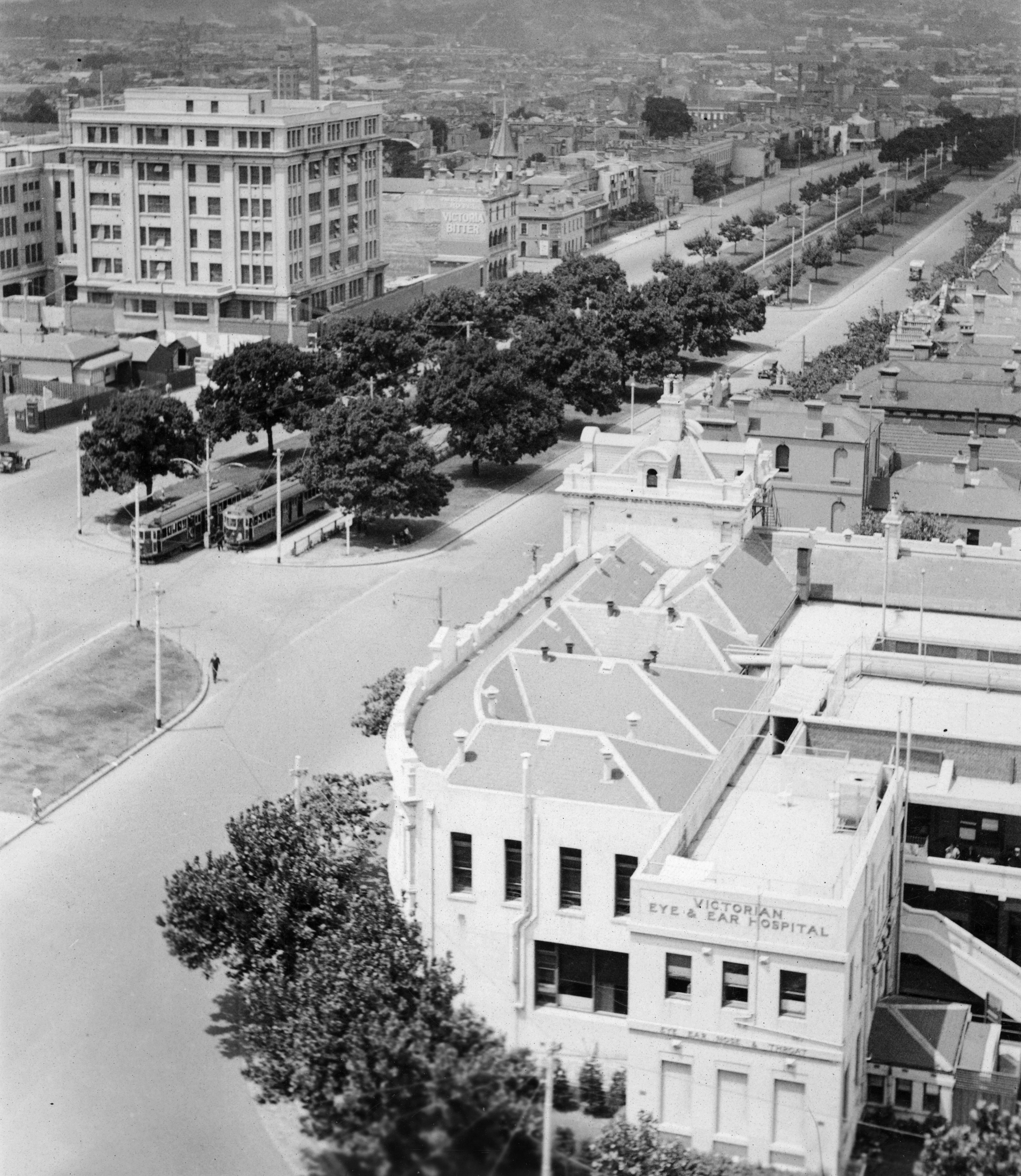 Victoria Parade, Fitzroy, 1935